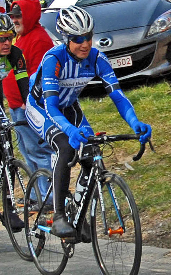 REIJNEN Kiel (USA) op de Berendries tijdens de Driedaagse van DE PANNE-KOKSIJDE 2013